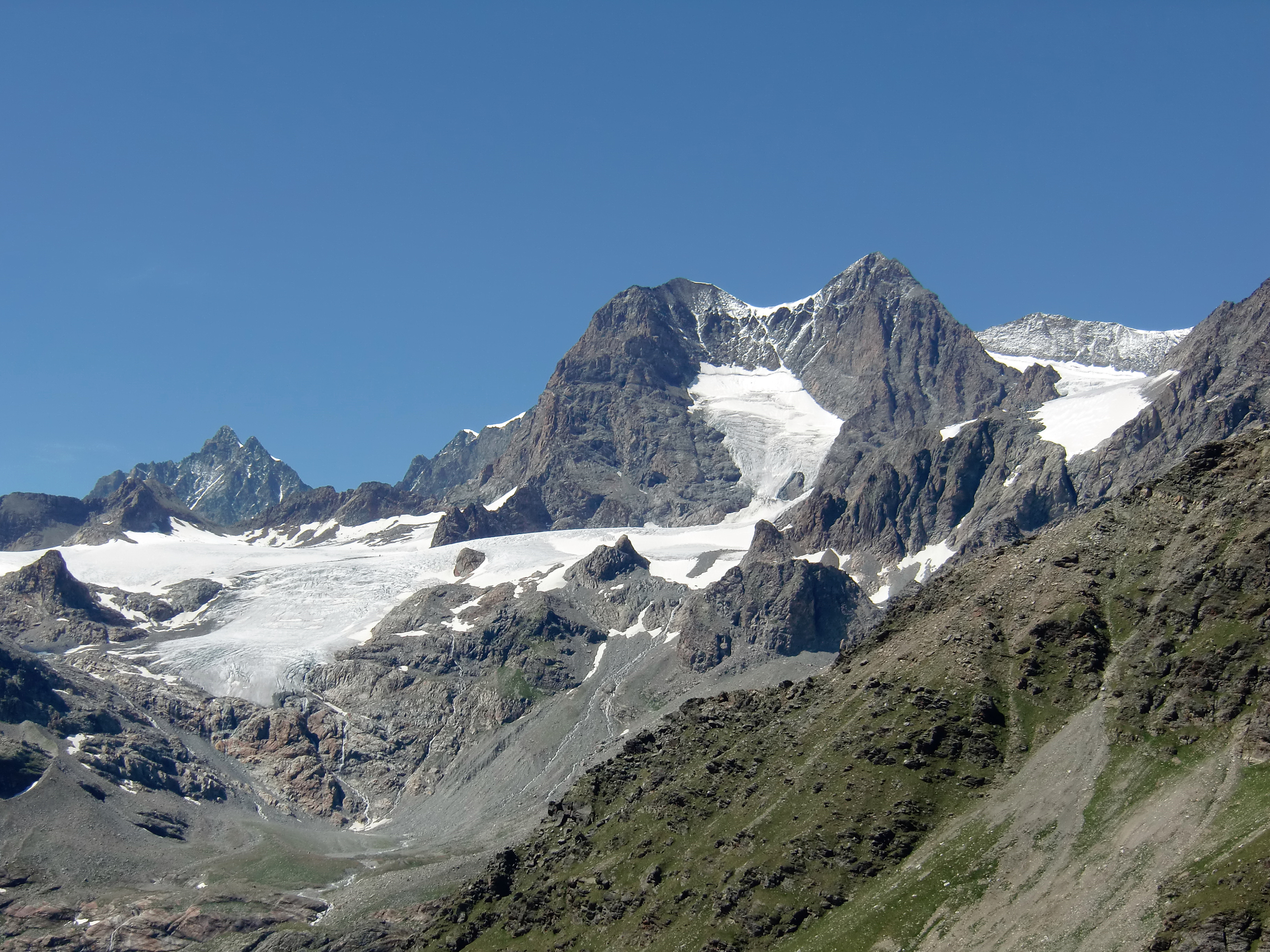 Sicht auf den Piz Argient (links) und den Piz Zupò (rechts) mit dem östlichen Fellaria-Gletscher. Aufgenommen vom Passo di Canfinal in Poschiavo. Im Hintergrund links der Piz Roseg.